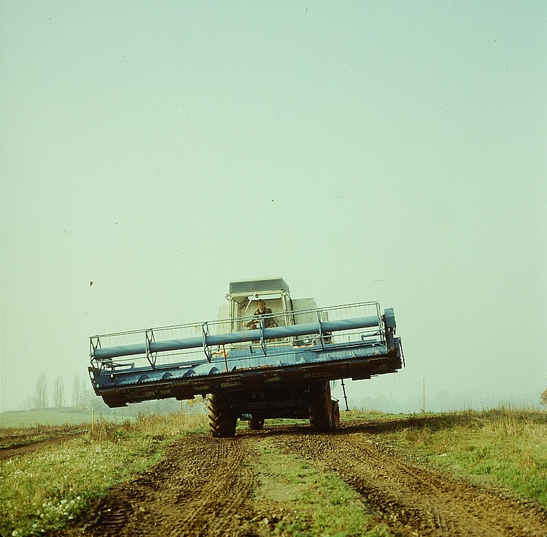 Original image description from the Deutsche FotothekMähdrescher